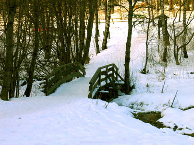 Erste Ruhrbruecke, selbst fotografiert